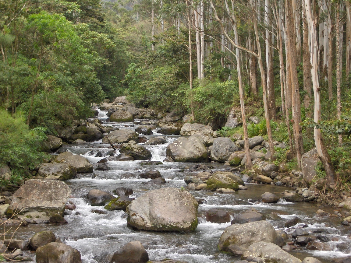 Rio en Boquete